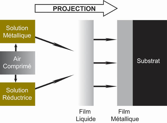 Principe de fonctionnement du Dépôt chimique dynamique: jetmetal